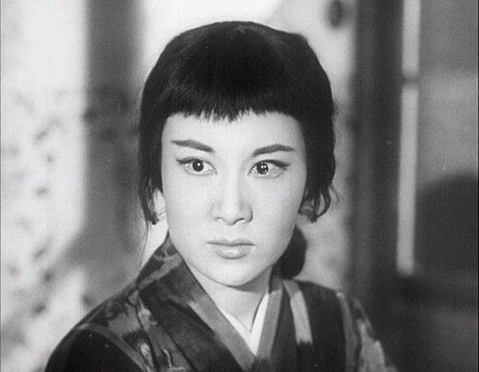 Ли Лихуа в фильме "Мадам Батерфляй"